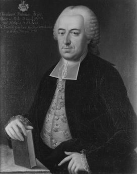 Gemälde in der Professorengalerie Tübingen